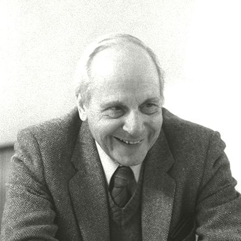 Gerd Bastian 1986 im Bundestag